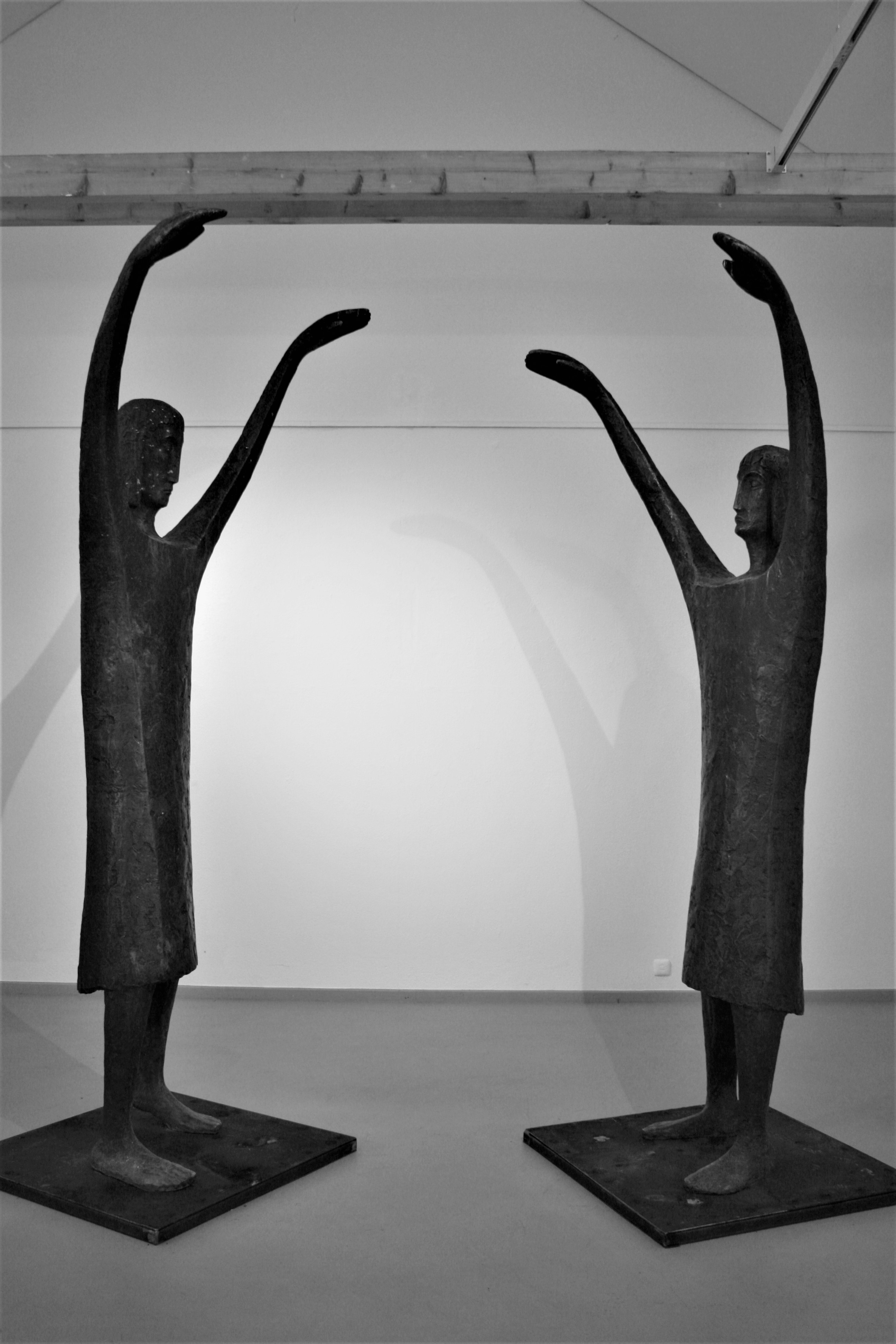 Bronzeguss, h = 300 cm